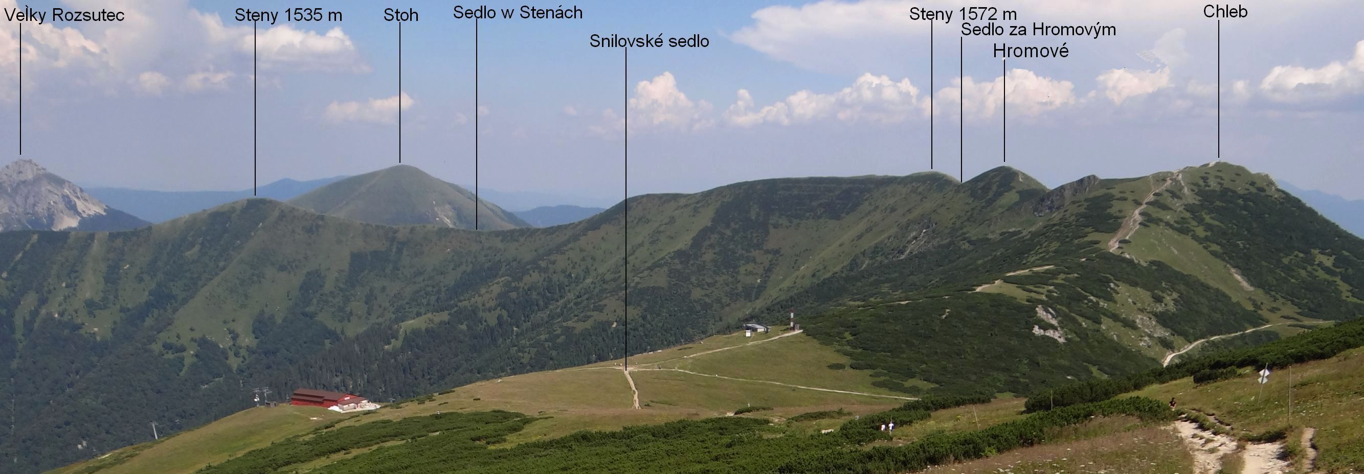 Steny